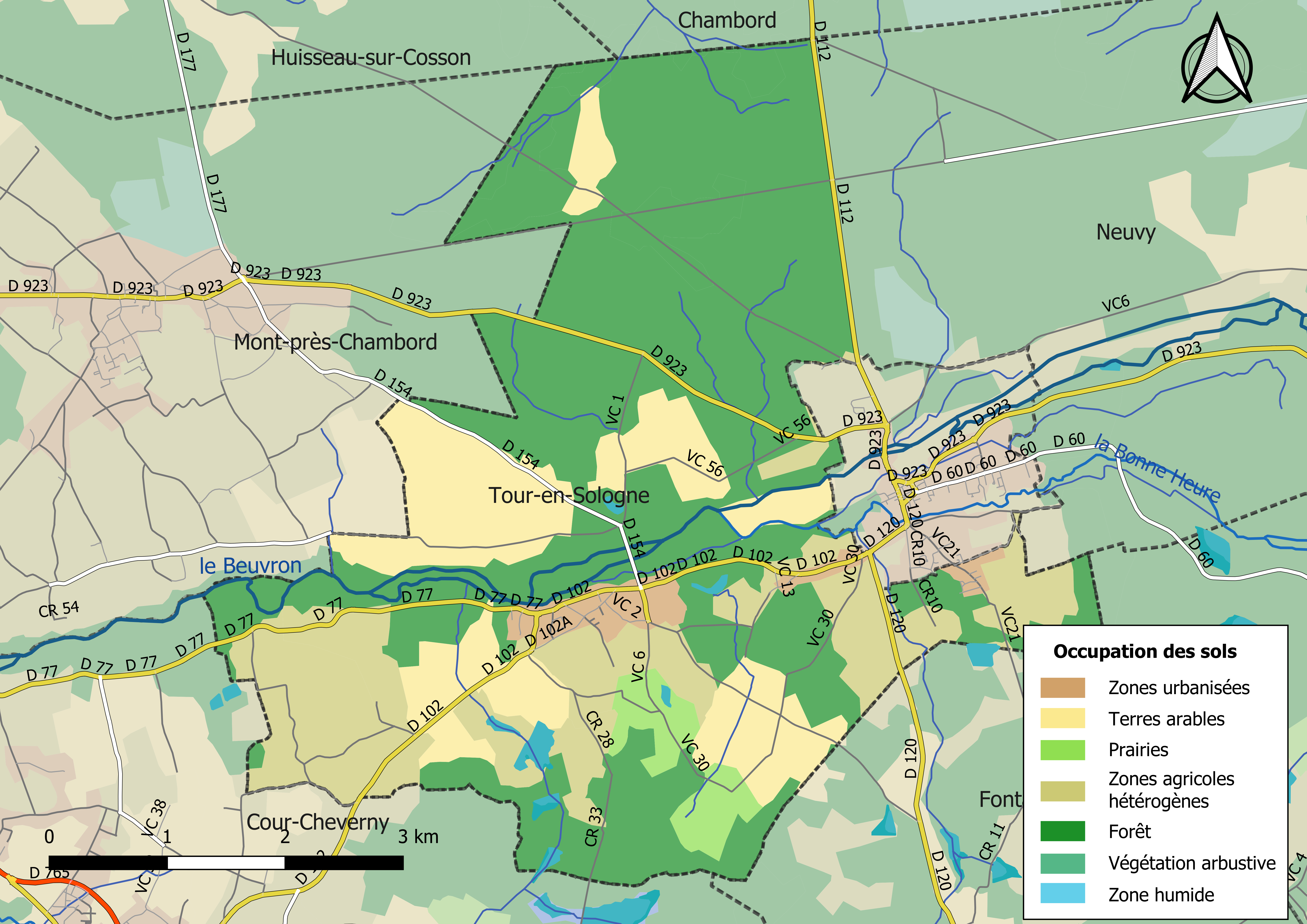 Carte des infrastructures et de l’occupation des sols en 2018 de la commune de Tour-en-Sologne (France).